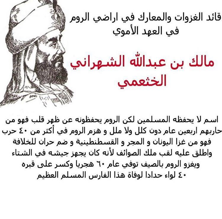 كان مالك أميراً على الجيوش في غزوة الروم أربعين سنة، أيام معاوية وقبلها، وأيام يزيد، وأيام عبد الملك بن مروان.